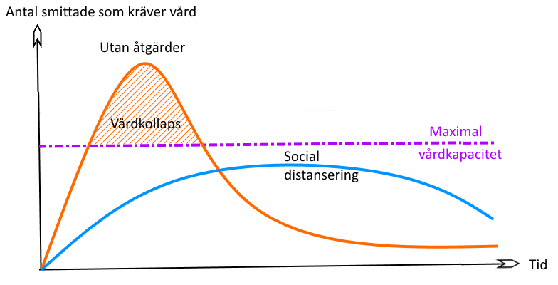 Den oranga kurvan visar hur smittan fort sprider sig och därigenom skapar ett större vårdbehov än vad som finns tillgängligt och en vårdkollaps inträffar, där behövande helt enkelt blir utan vård. Den blå kurvan visar förloppet om adekvata åtgärder vidtagits i tid. Det totala antalet smittade förblir detsamma, men är spridda över tid så att vården aldrig överbelastas.